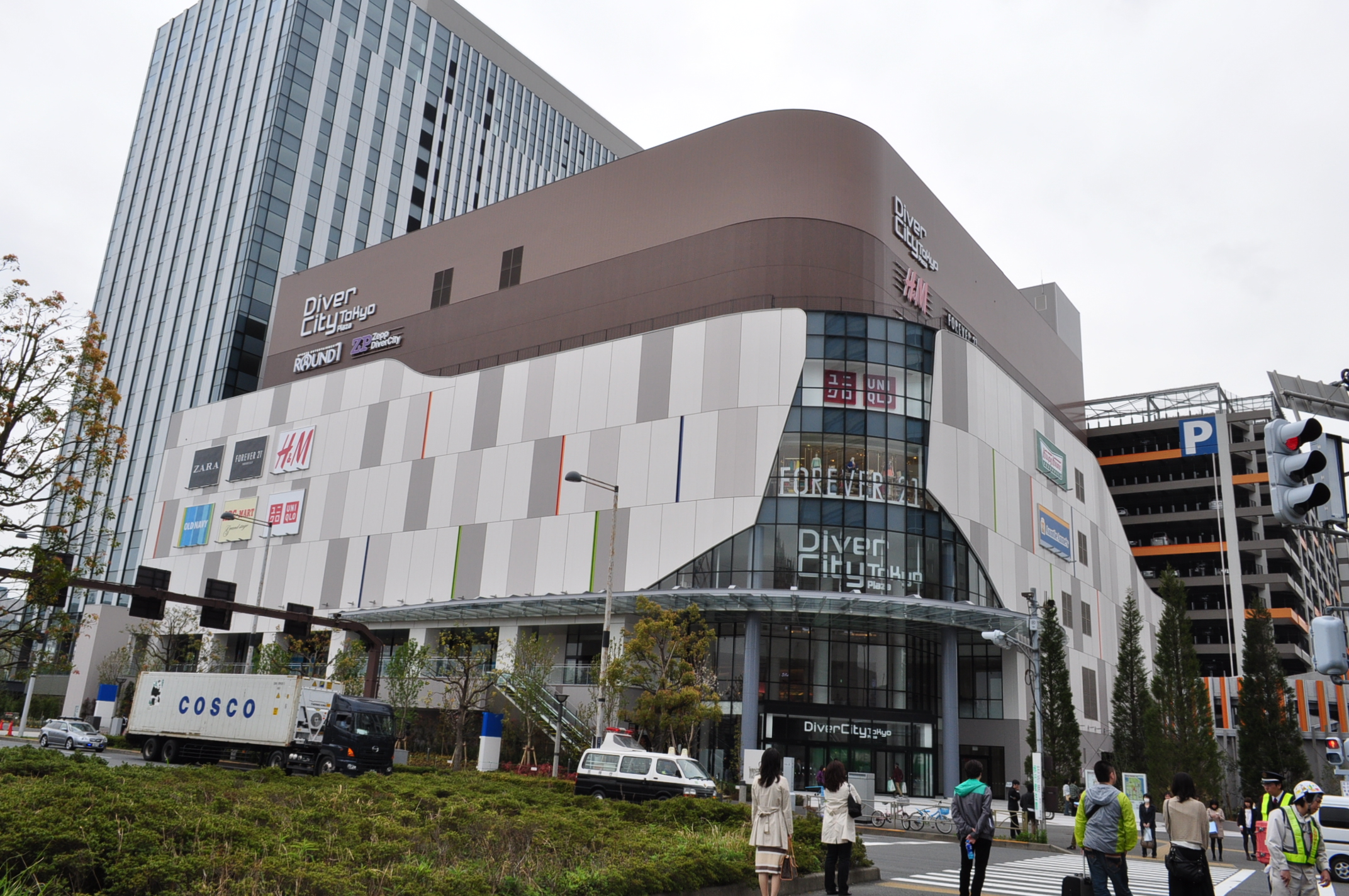 ダイバーシティ東京プラザ